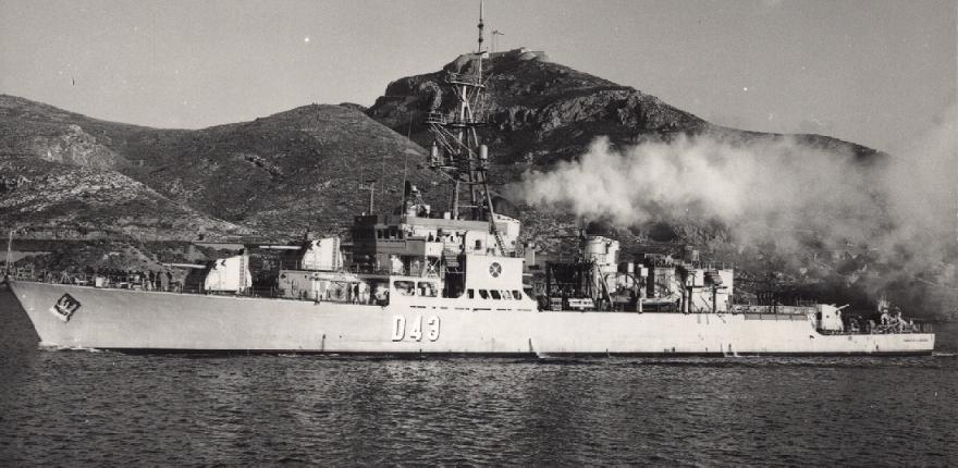 Destructor de la Armada Española "Marqués de la Ensenada D-43" en Cartagena